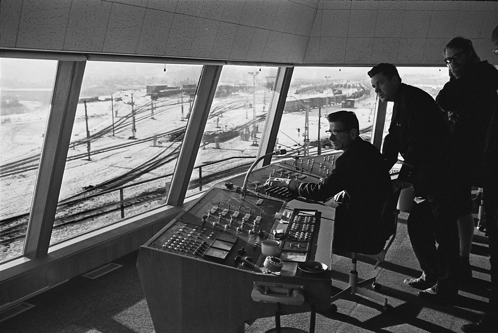 Interiør fra stillverket på Alnabru skiftestasjon 25. februar 1973, tre år etter at stillverket ble tatt i bruk.